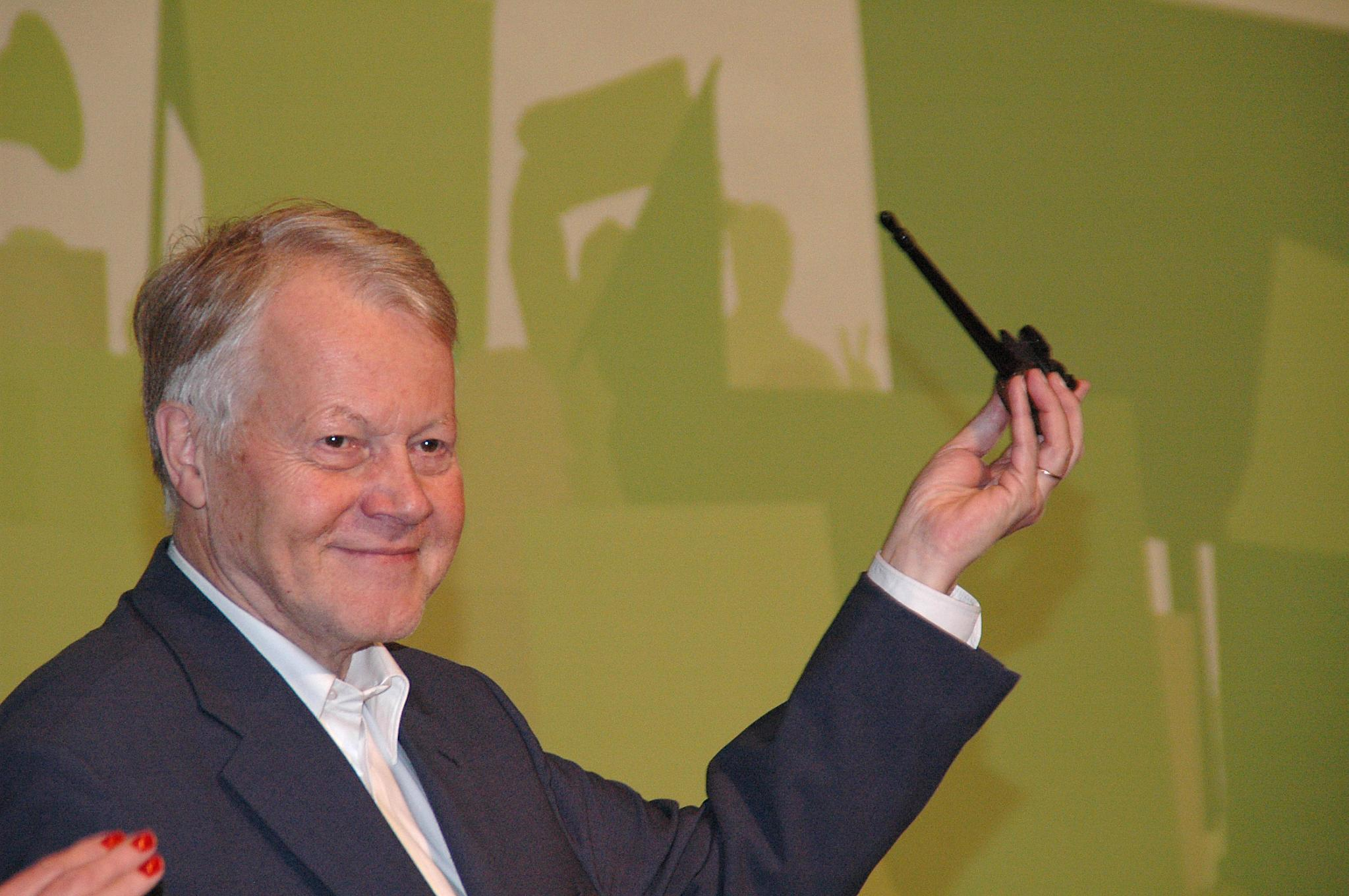 Krefeld/NRW